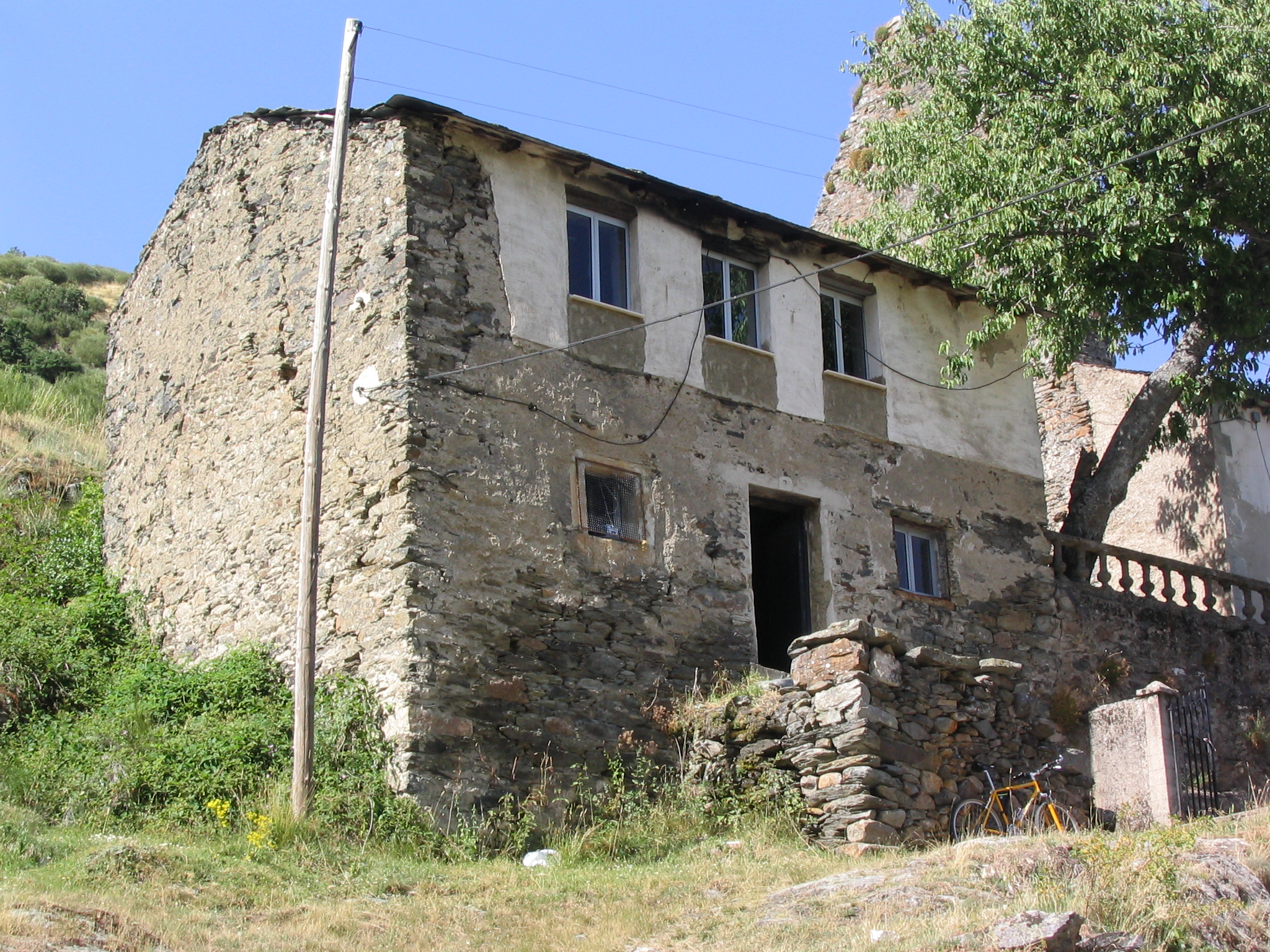 Vegapujín, León, España. Escuelas.